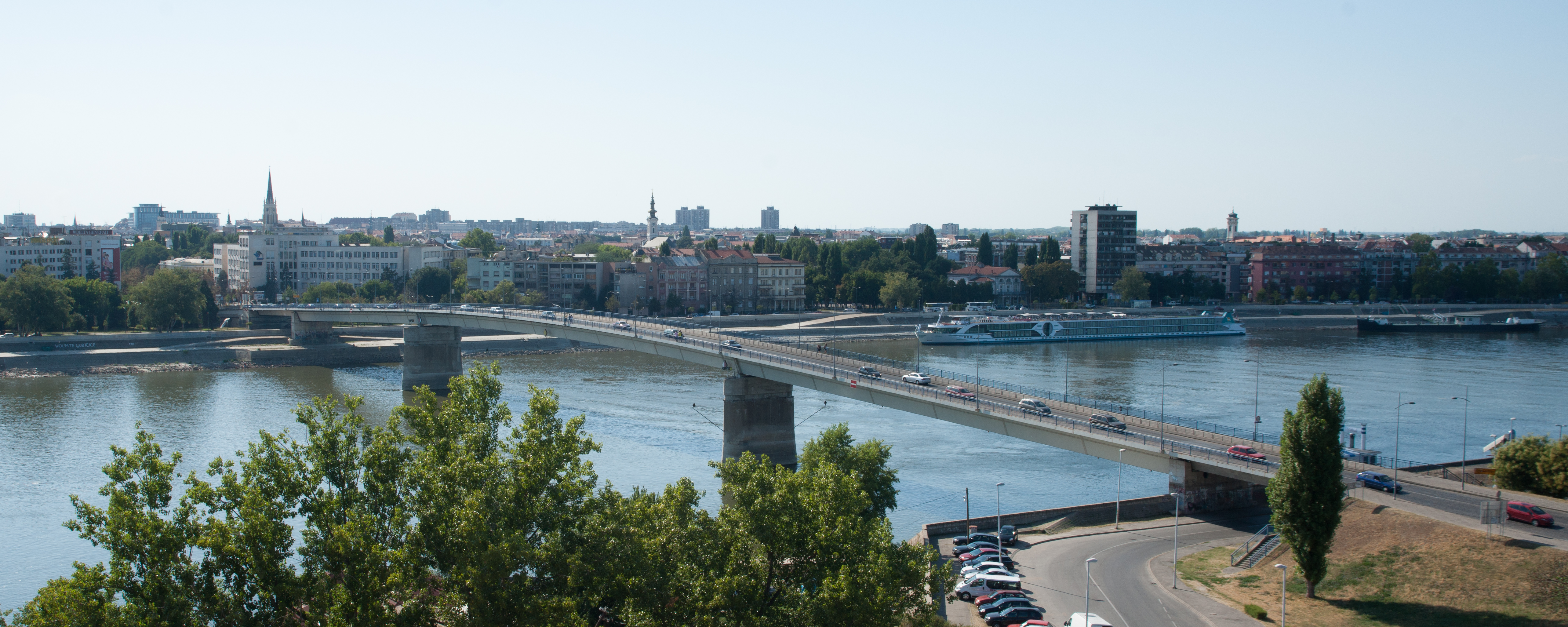 Varadin bridge, Novi Sad